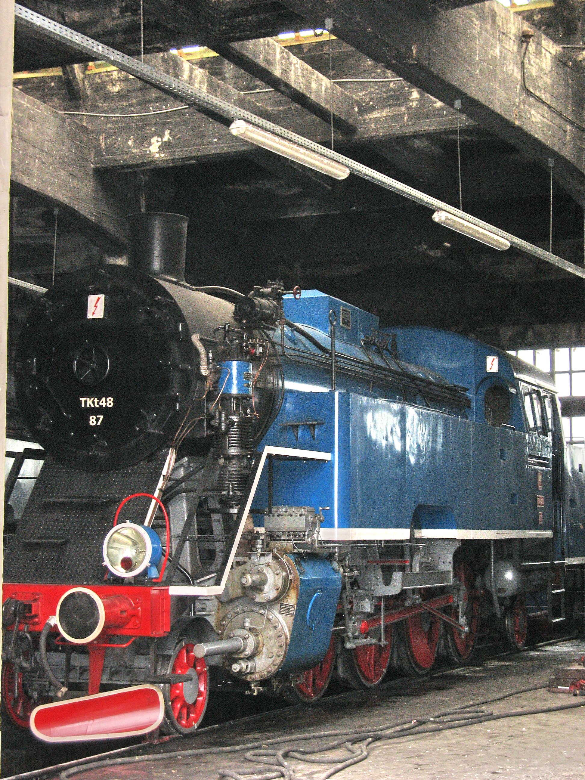 Image éclaircie du téléchargement de user:Sietske Légende initiale : "A locomotive in the Belgian village of Mariembourg. Tourists can take a ride with it."Locomotive polonaise TKt 48-87 du Chemin de fer à Vapeur des Trois Vallées